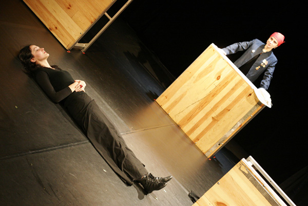 Сцена з вистави "Ніч ЕлеоНора День" (режисер - Олександр Балабан, Національний центр театрального мистецтва ім.Леся Курбаса, 2008)